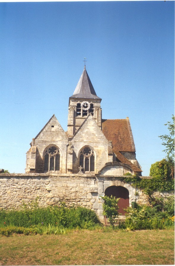 Eglise de Brenouille ( Oise ), vue côté EST